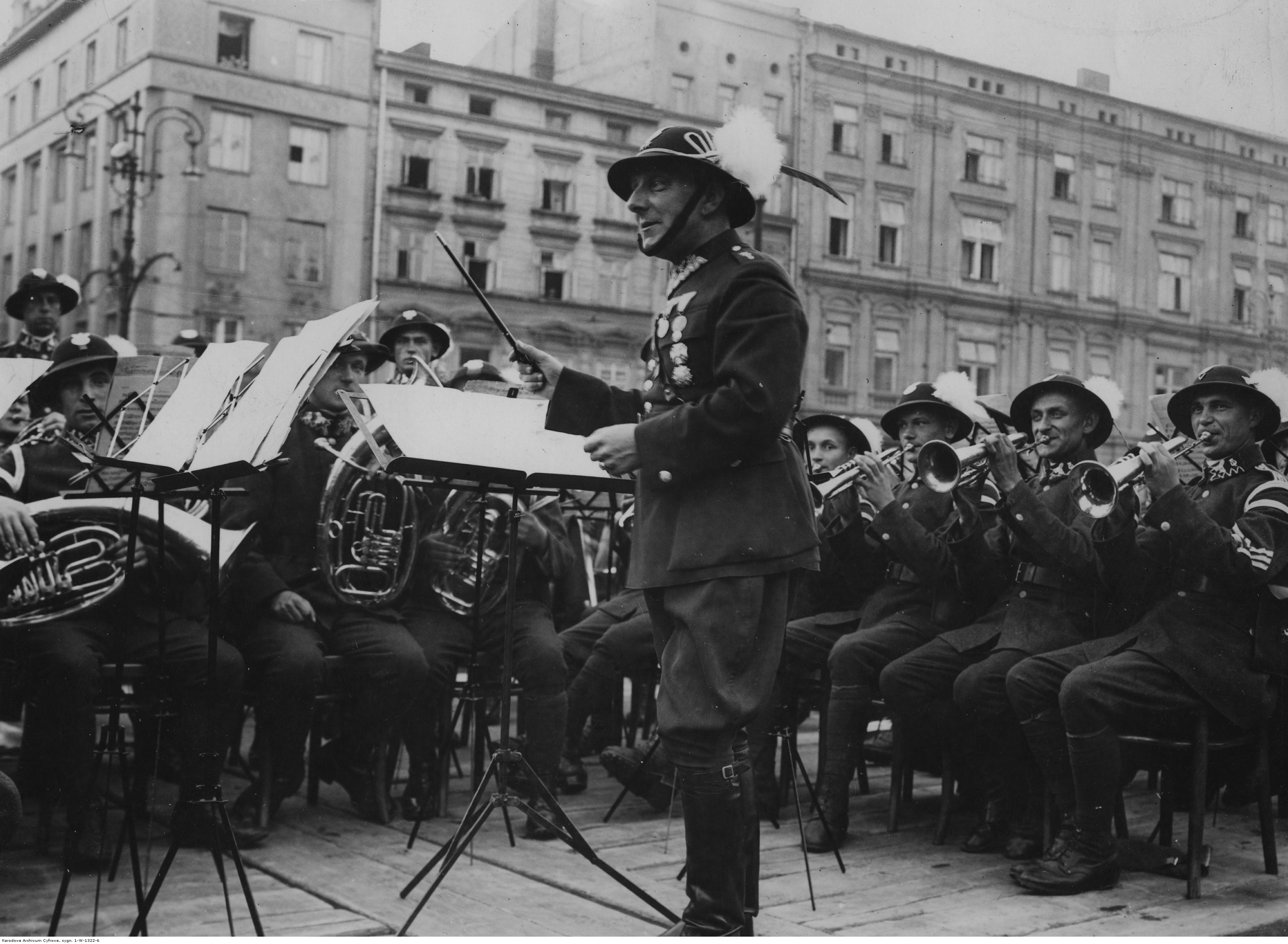 Wizyta 5 Pułku Strzelców Podhalańskich w Krakowie - dyrygent podczas koncertu orkiestry pułkowej. Koncern Ilustrowany Kurier Codzienny - Archiwum Ilustracji. Sygnatura: 1-W-1322-6